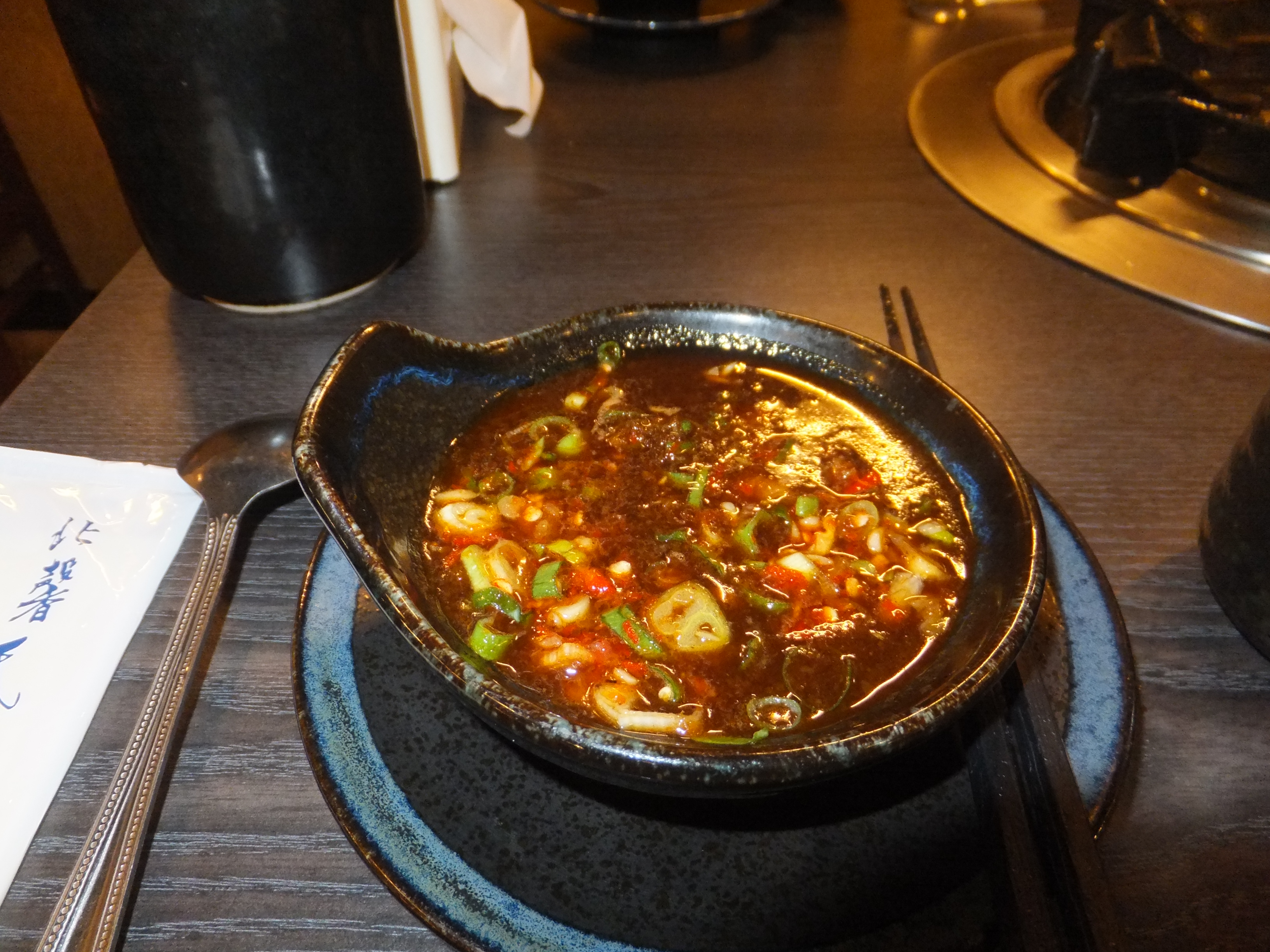 餐桌上的沙茶醬碗，通常火鍋用的沙茶醬常隨個人嗜好添加醬油、醋與蔥、蒜、辣椒等香料，以符合口味與增加份量、易於沾取。